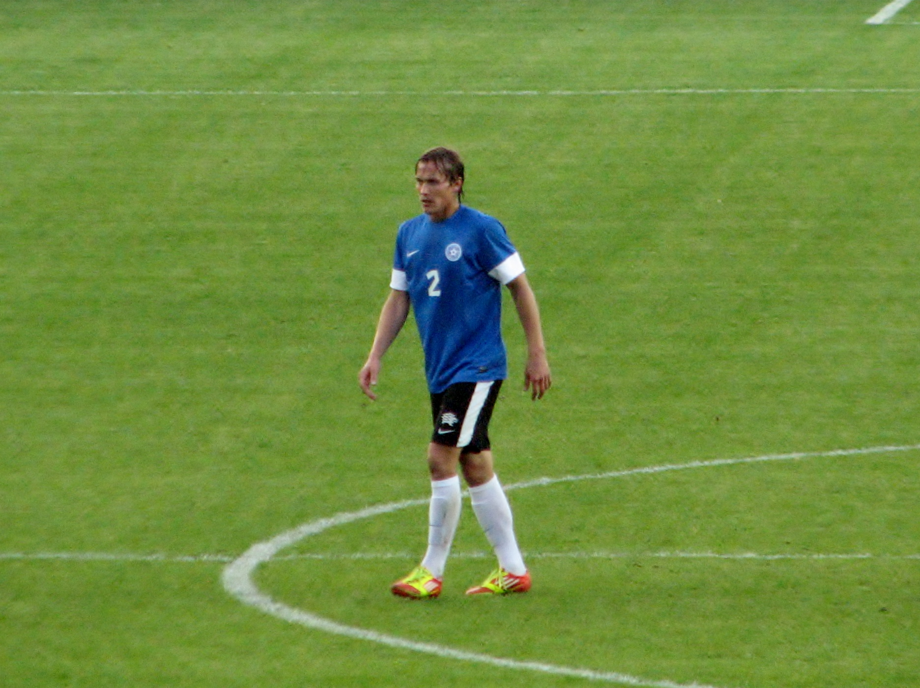 Alo Bärengrub mängimas Eesti koondises Tadžikistani jalgpallikoondise vastu A. Le Coqi staationil